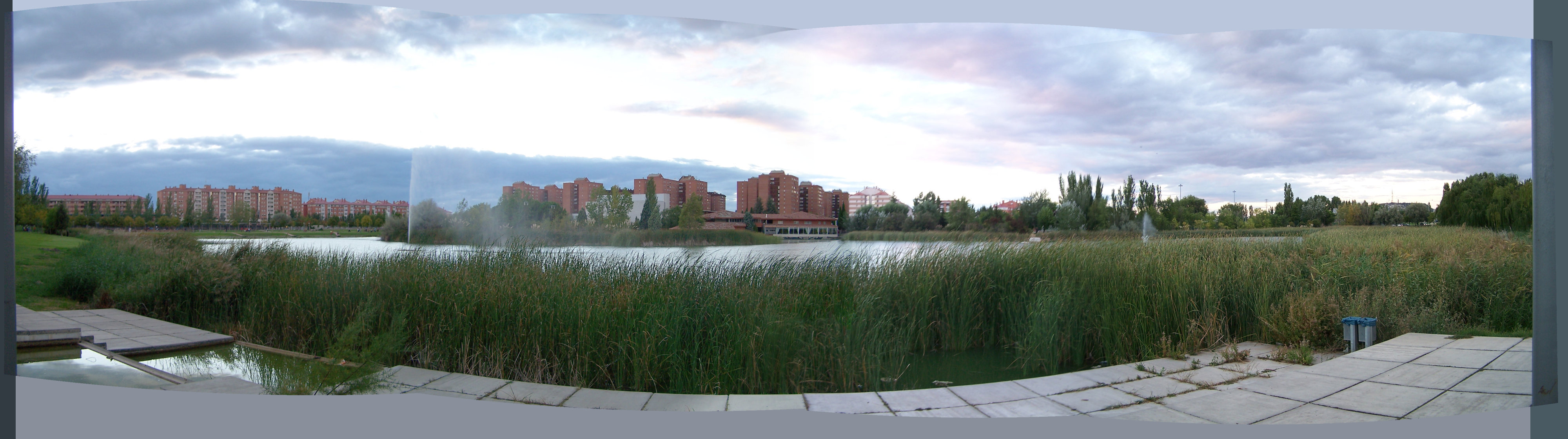 Laguna de Duero, panorámica del lago